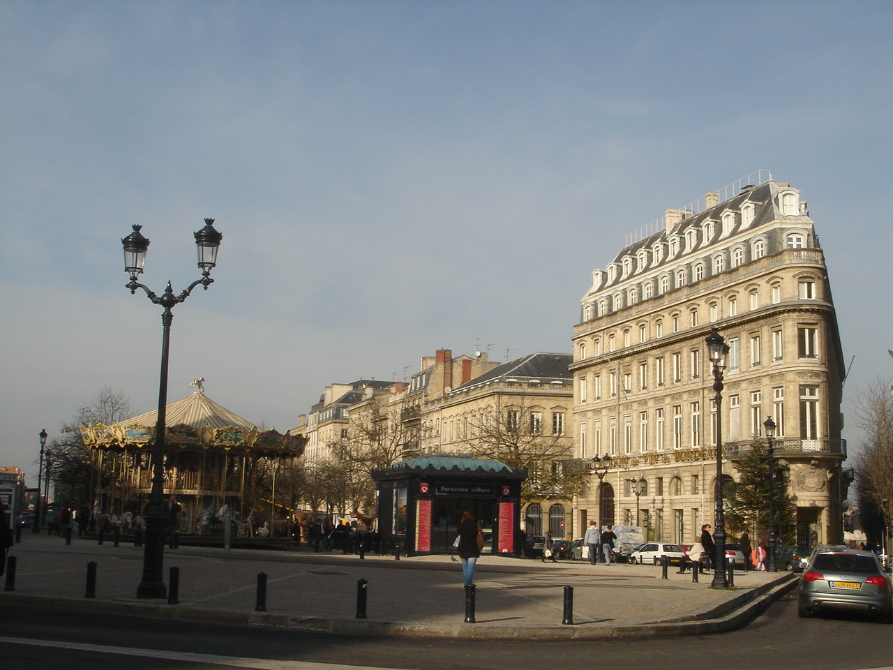 Die Allées de Tourny in Bordeaux (Frankreich). Rechts die Maison Internationale du Vin.